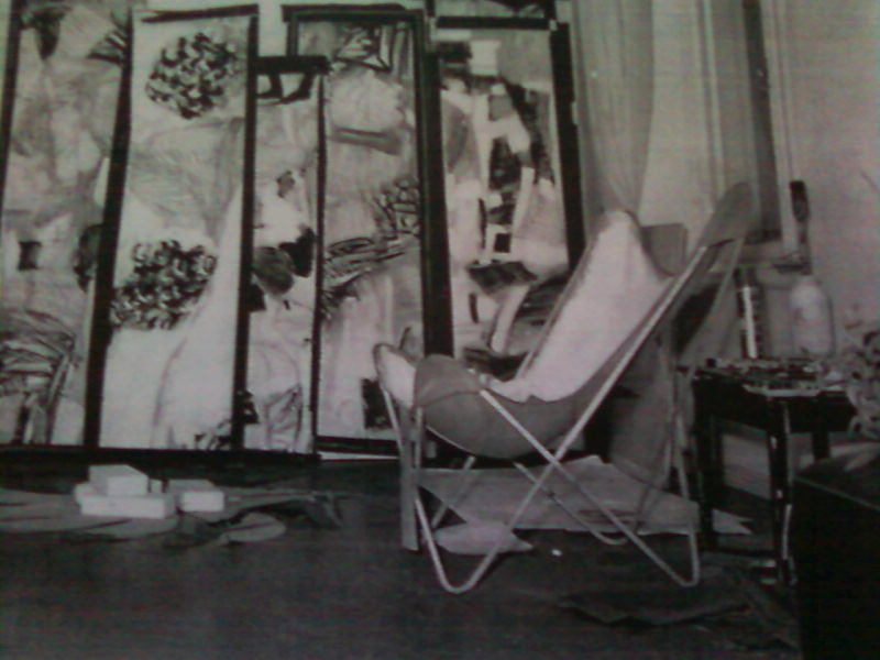 Małgorzata "Mao Star" Starowieyska - pracownia berlińska